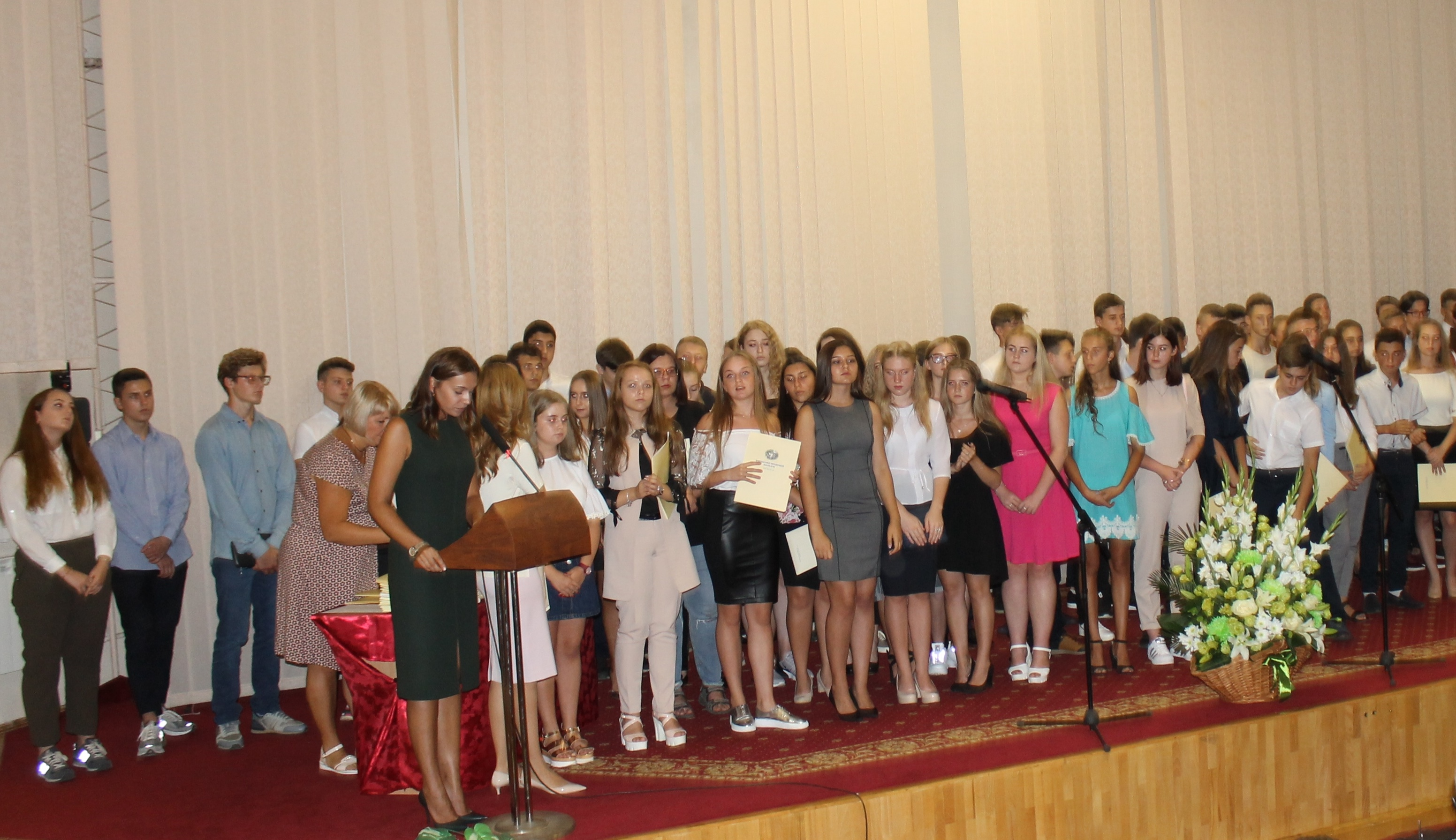 Вручення Студентських ФПК 2018.